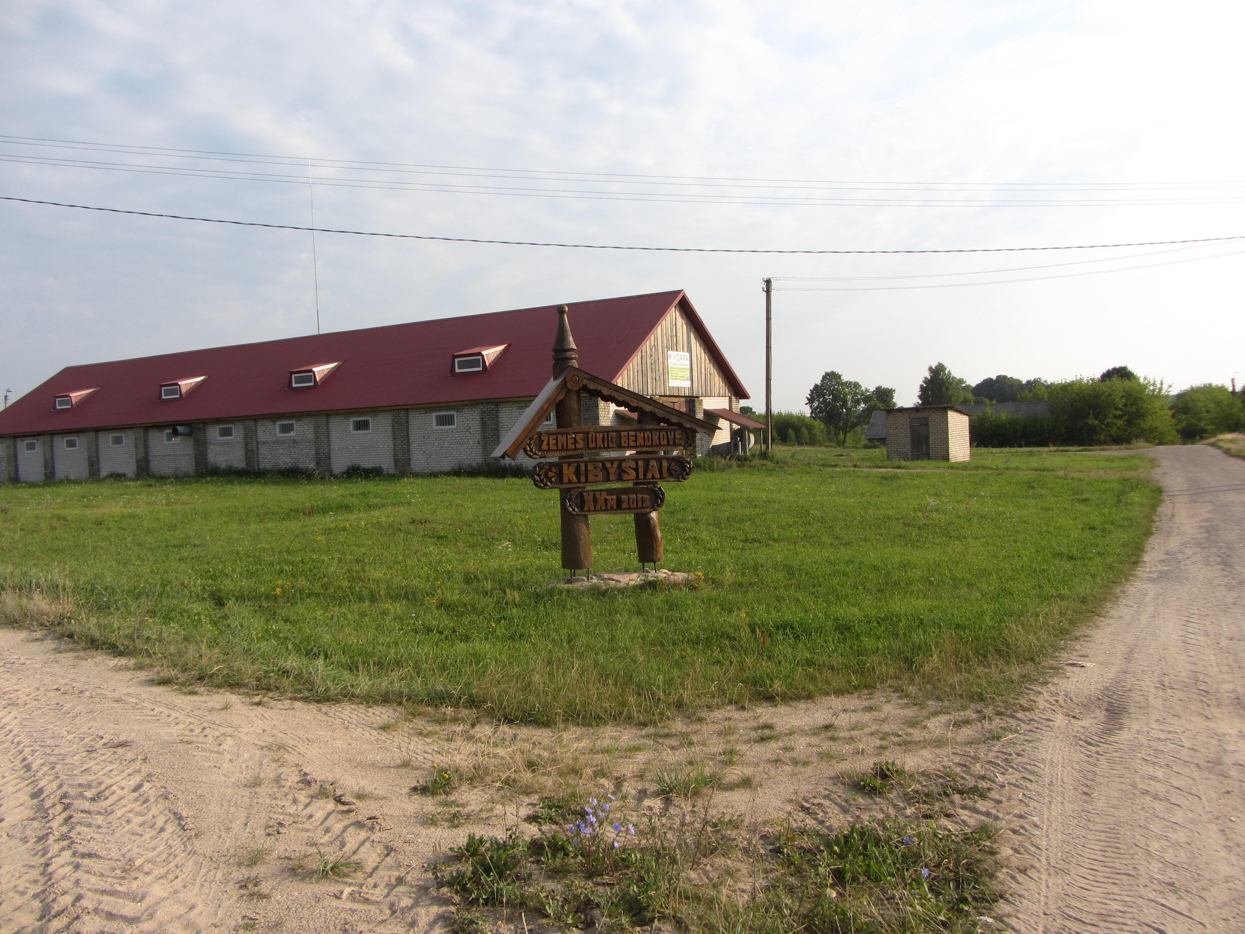 Kibyšiai, Lithuania